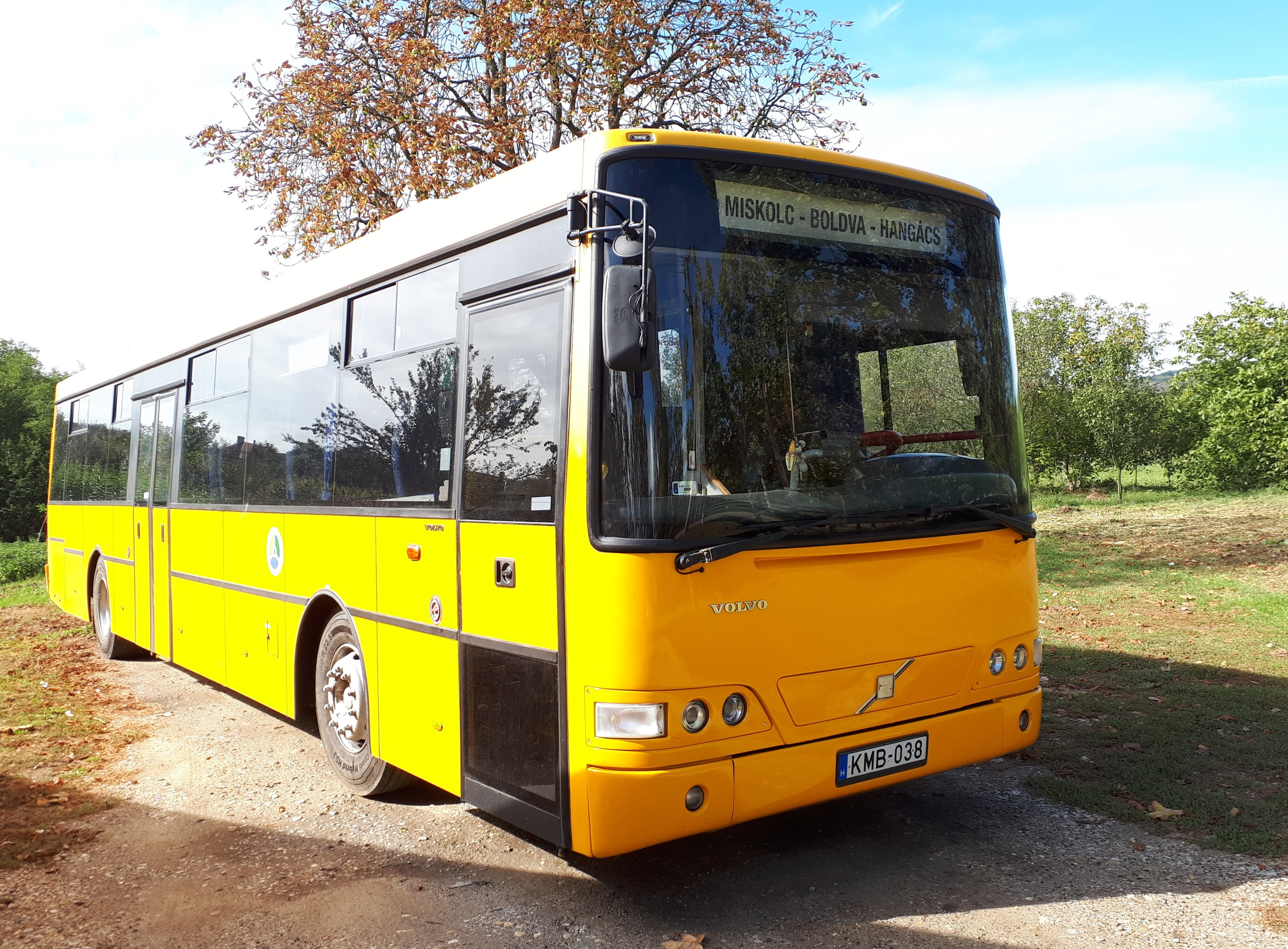 Az ÉMKK KMB-038 rendszámú Volvo Alfa Regio típusú busza Nyomáron, a 3776-os helyközi járaton.